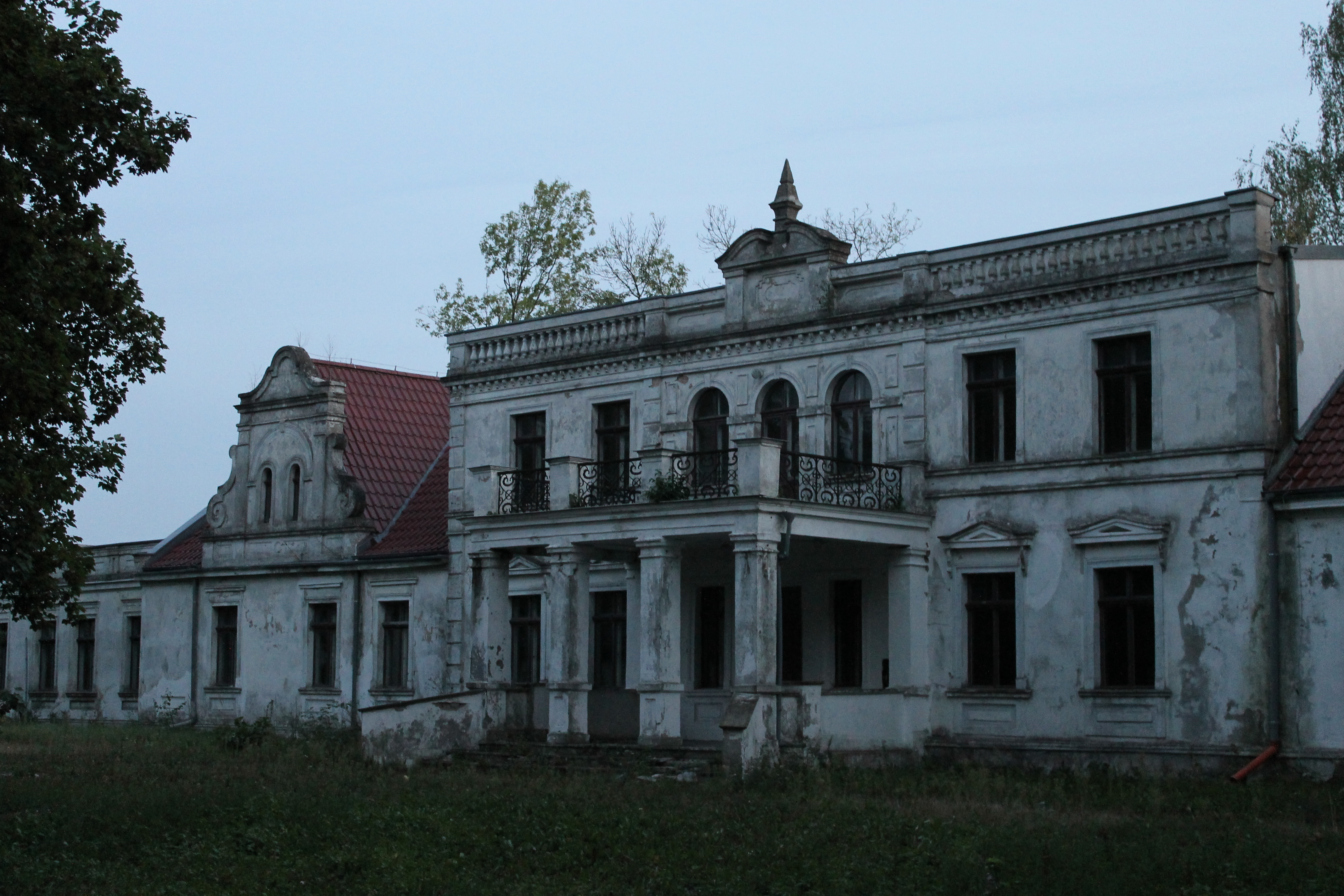 Wałycz - pałac, XIX, pocz. XX, 1979